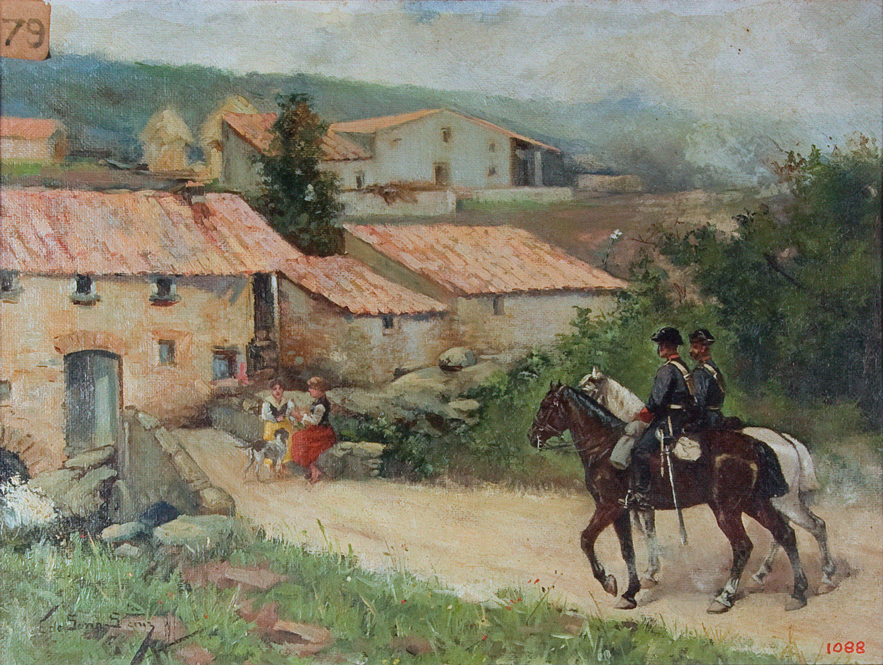 La guàrdia civil entrant a un poble. pintura sobre tela. Biblioteca Museu Víctor Balaguer